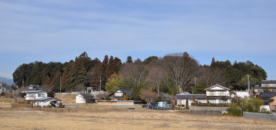 現在の美しの杜（美女ヶ森）